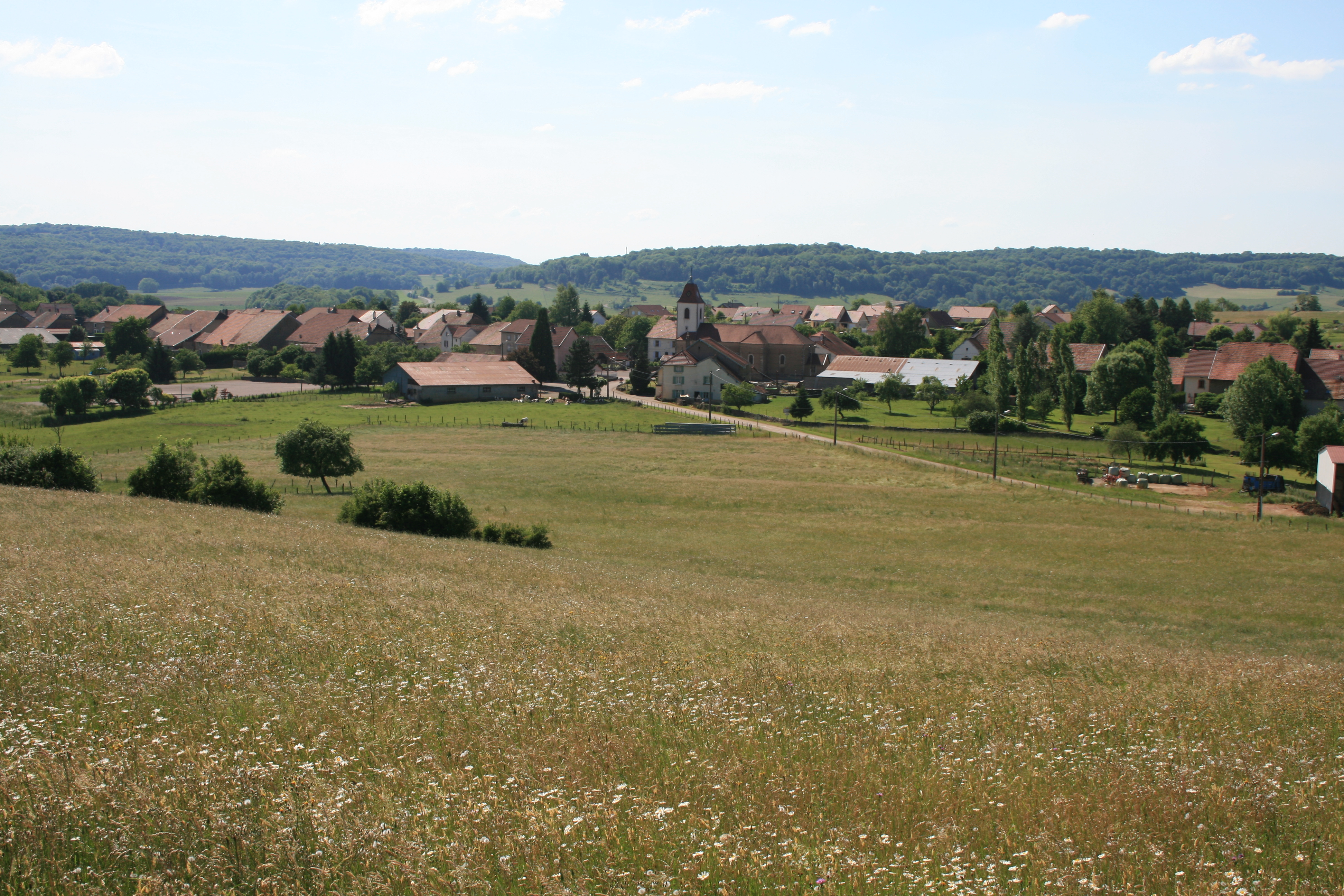 Autrey-les-Cerre ( Haute-Saône ) vue générale du village depuis la route de Montjustin